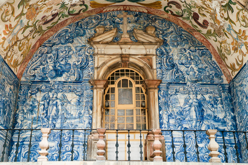 Óbidos - Varanda